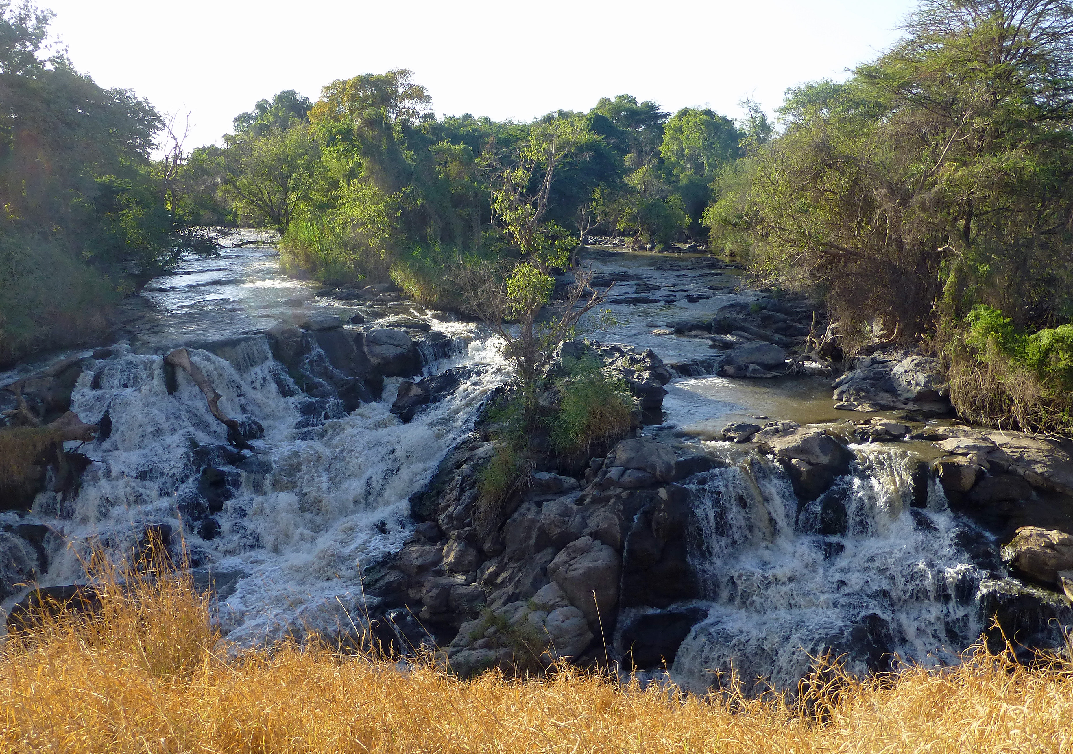 Chutes d'eau de la rivière Awash au Parc national d'Awash (Ethiopie)